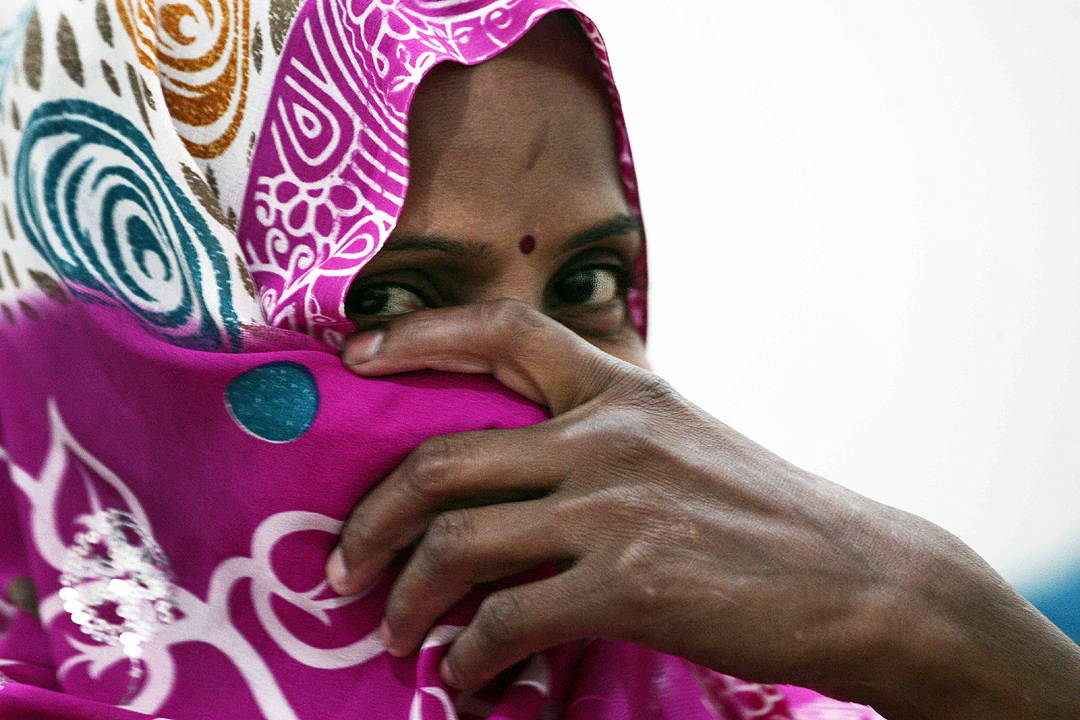 1005 India